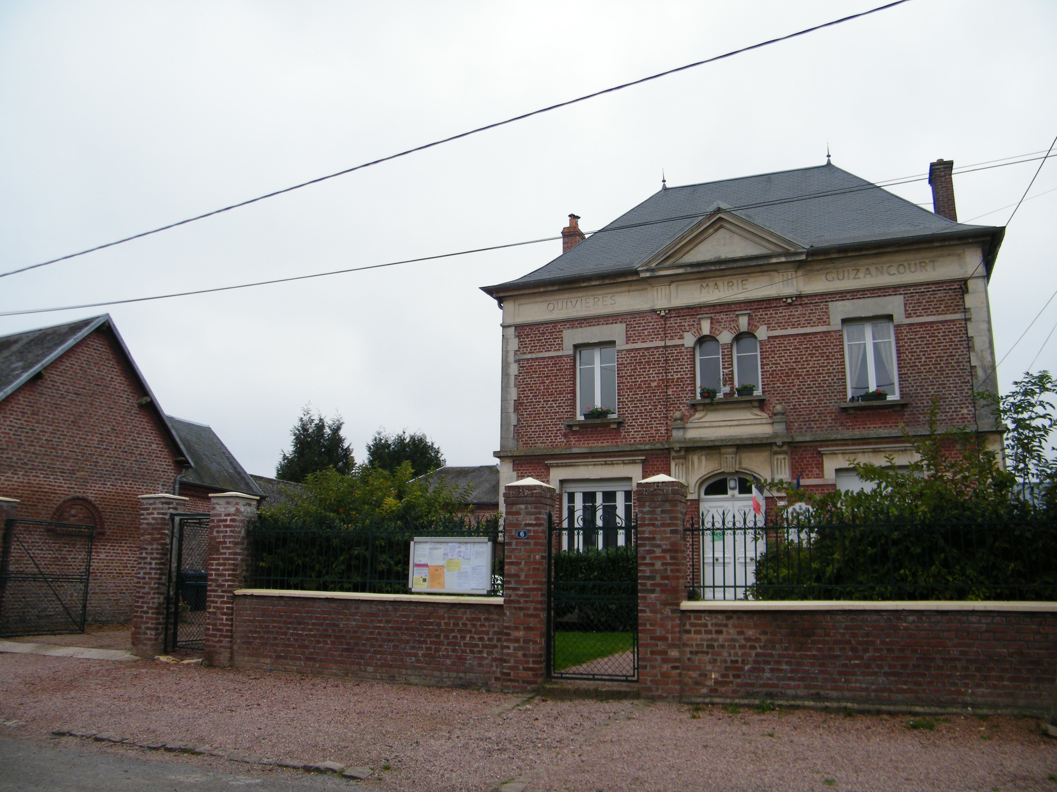 Bâtiments communaux.